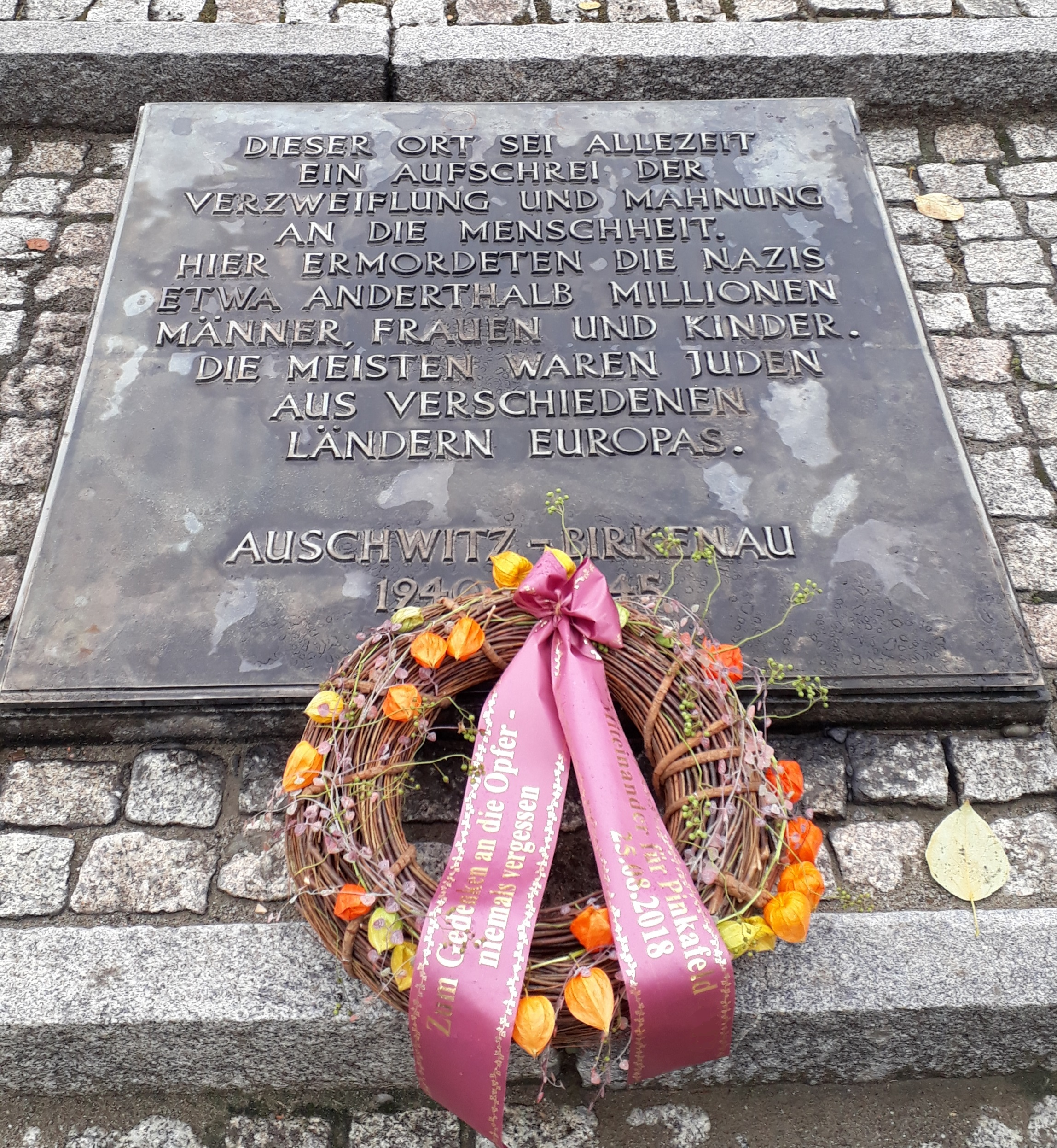 Kranz einer Besuchergruppe aus Pinkafeld/Österreich zur Erinnerung an die Opfer von Auschwitz im Vernichtungslager Auschwitz-Birkenau